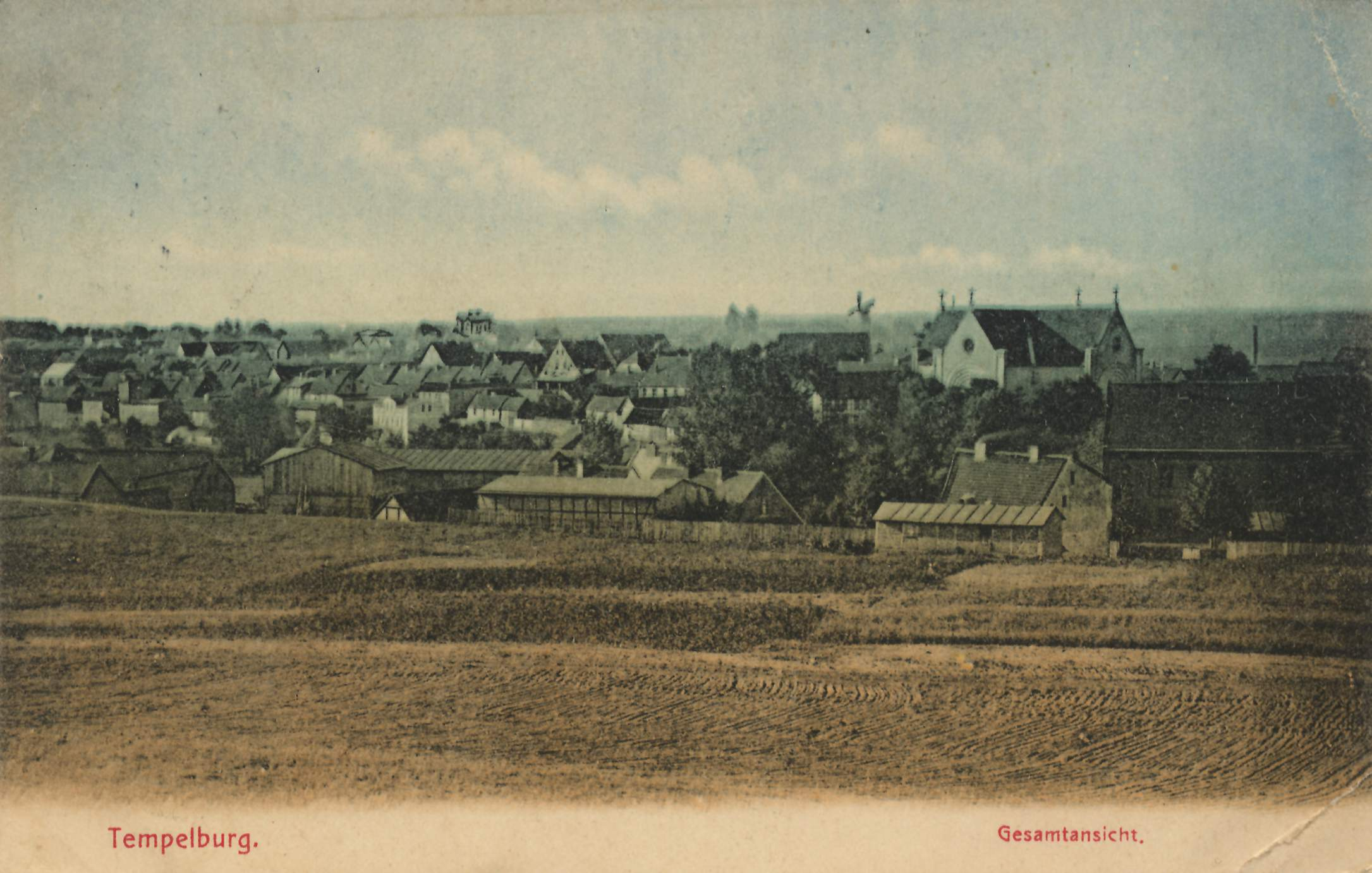 Stadtansicht